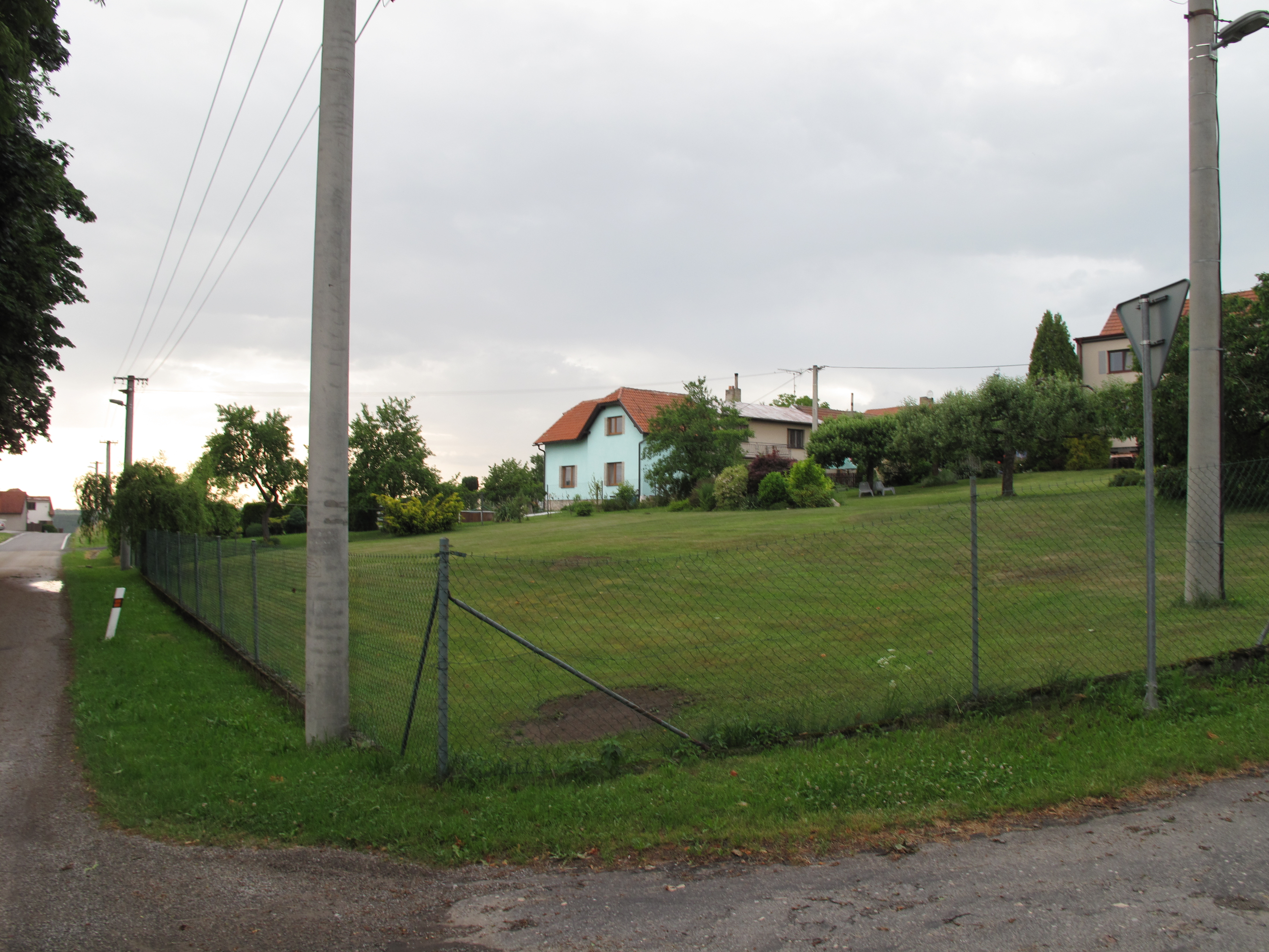 Nové Lány, Česká republika.